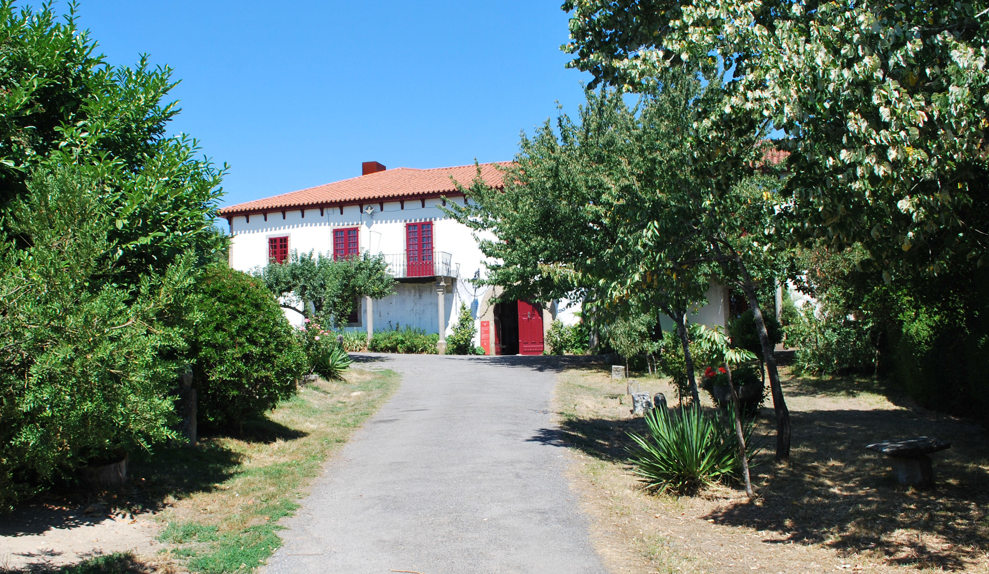 Edifico Pazo de Tor en Monforte de Lemos, Deputación de Lugo Galiza Spain